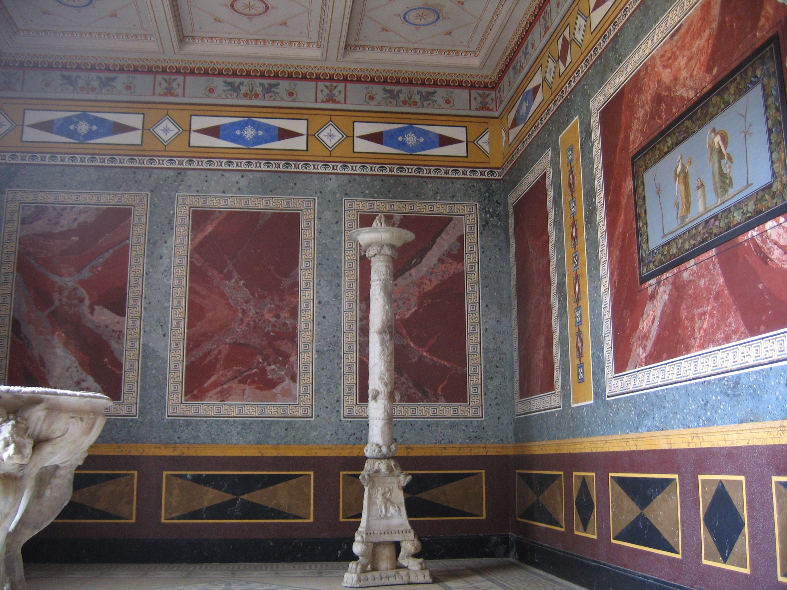 Pompeijanum, innen